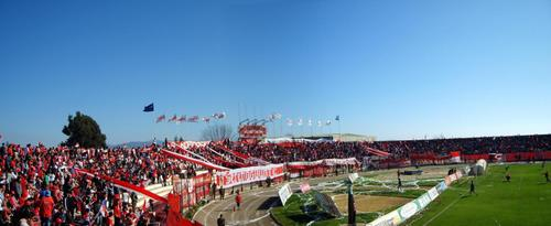 Estadio la portada codo norte con la hinchada papayera de Club Deportes La Serena